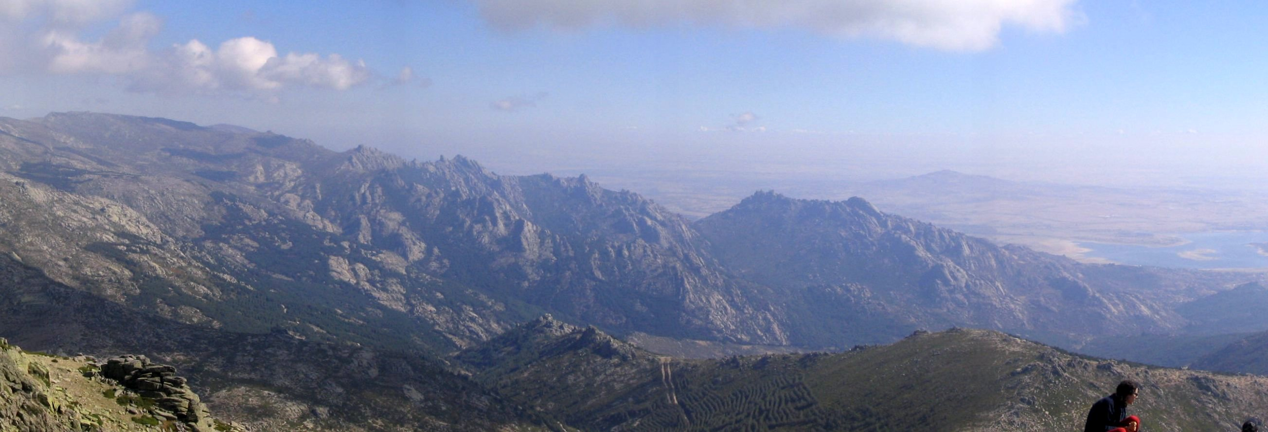 Vista panorámica de La Pedriza desde el pico de La Maliciosa (Sierra de Guadarrama), España.